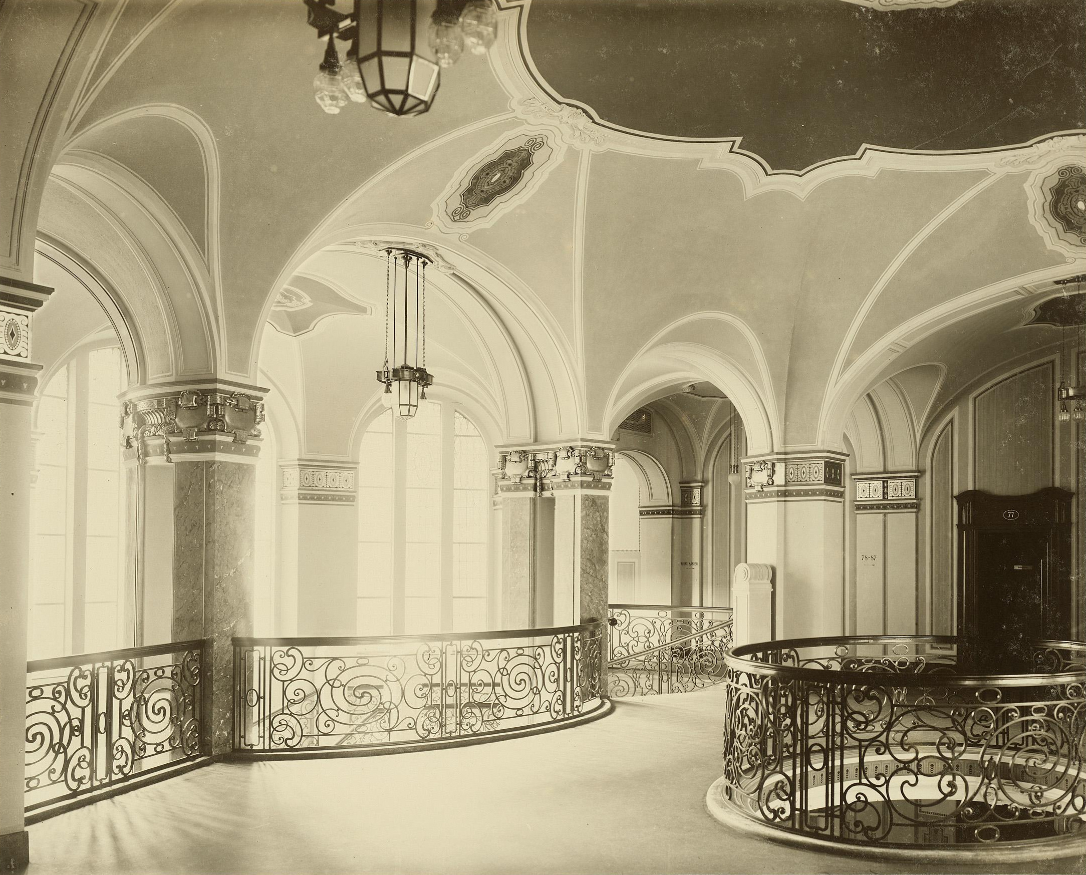 Obere Treppenhalle, Oberlandesgericht Düsseldorf (erbaut 1906-1910)